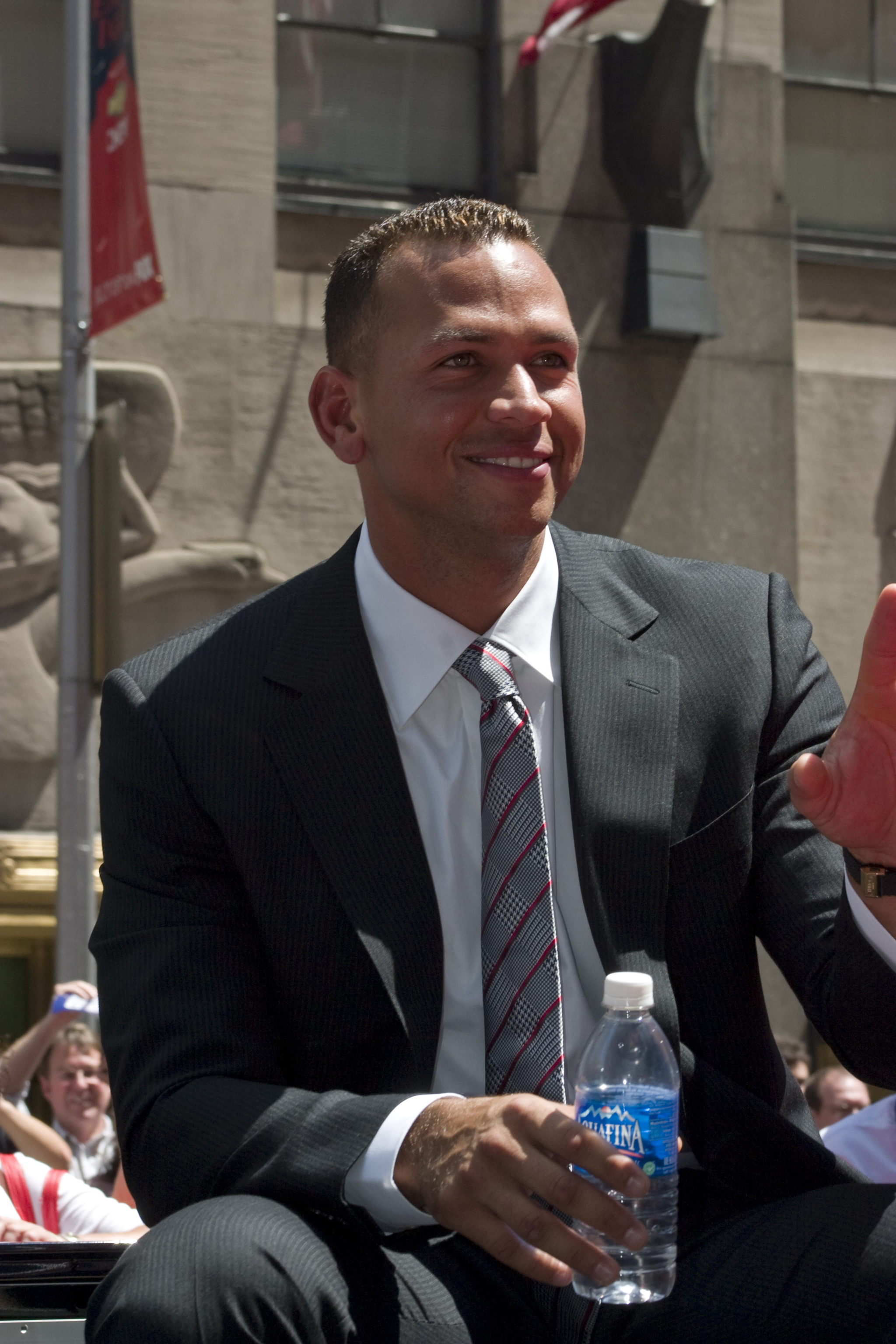 © Rubenstein, photographer Martyna Borkowski